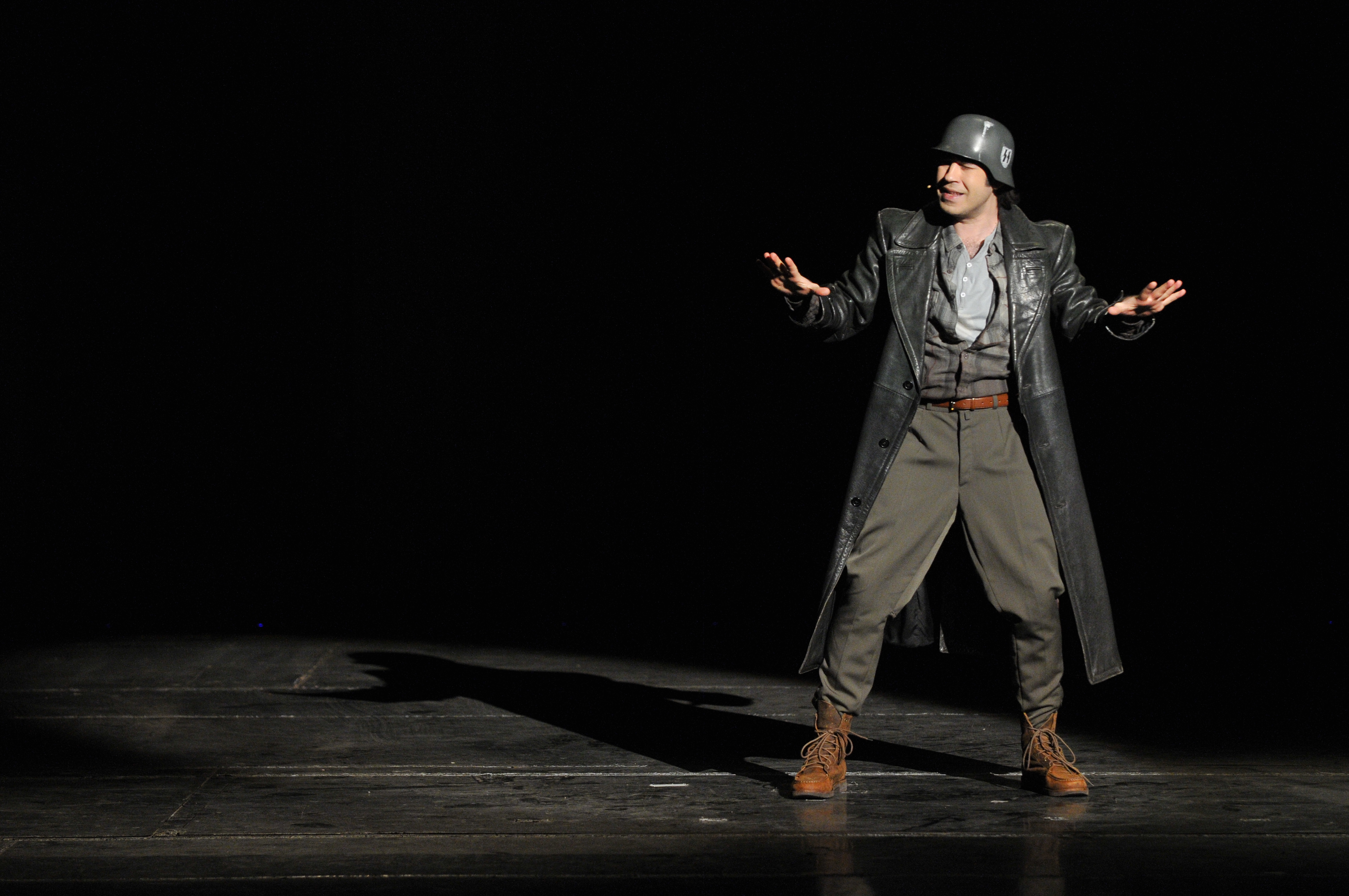 Premijera predstave "Producenti"